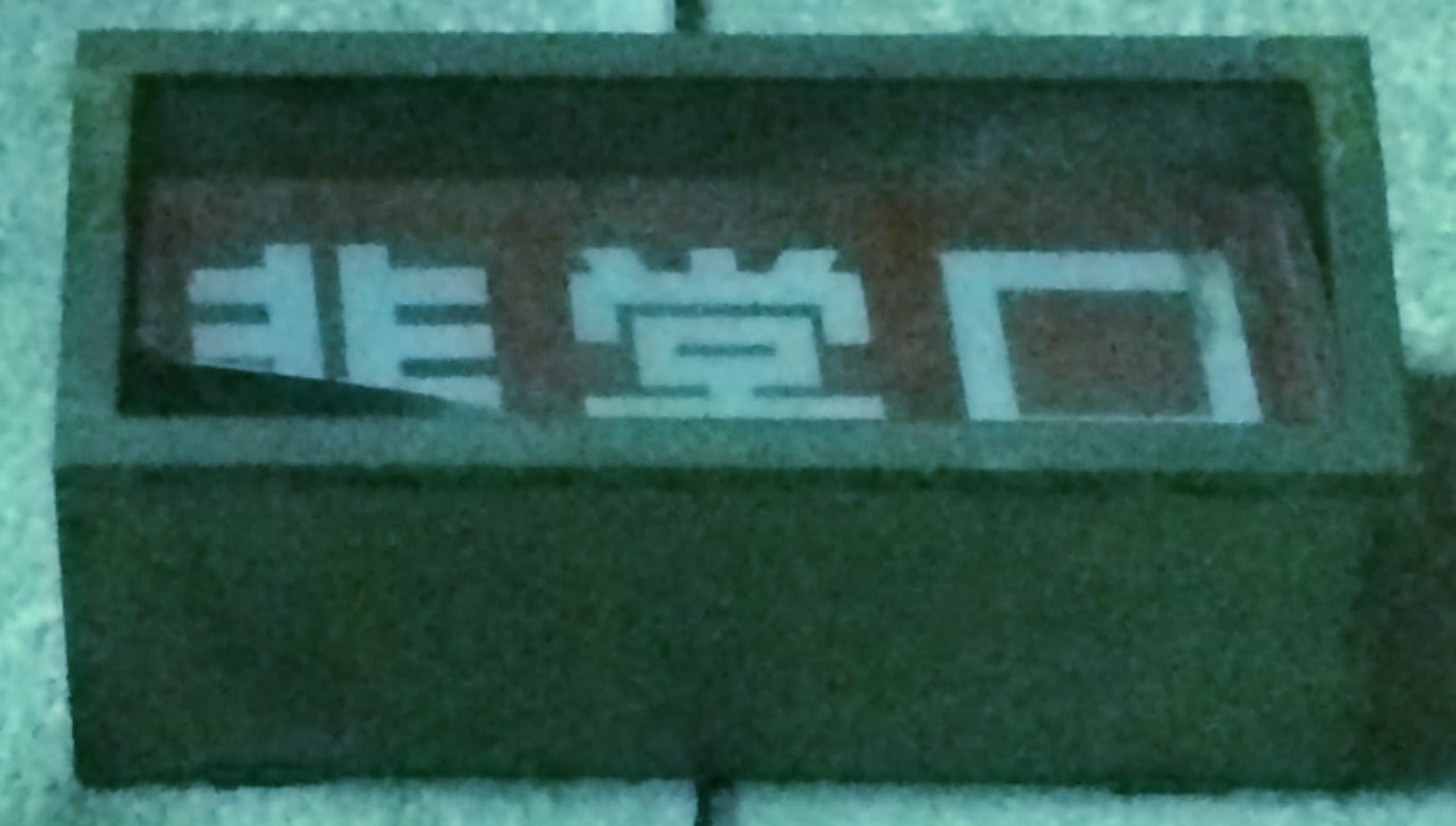 十日町市・体育館の避難口誘導灯